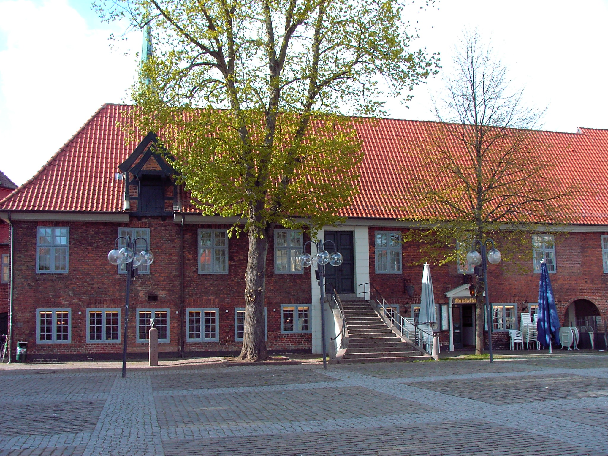 Eckernförde: former city hall